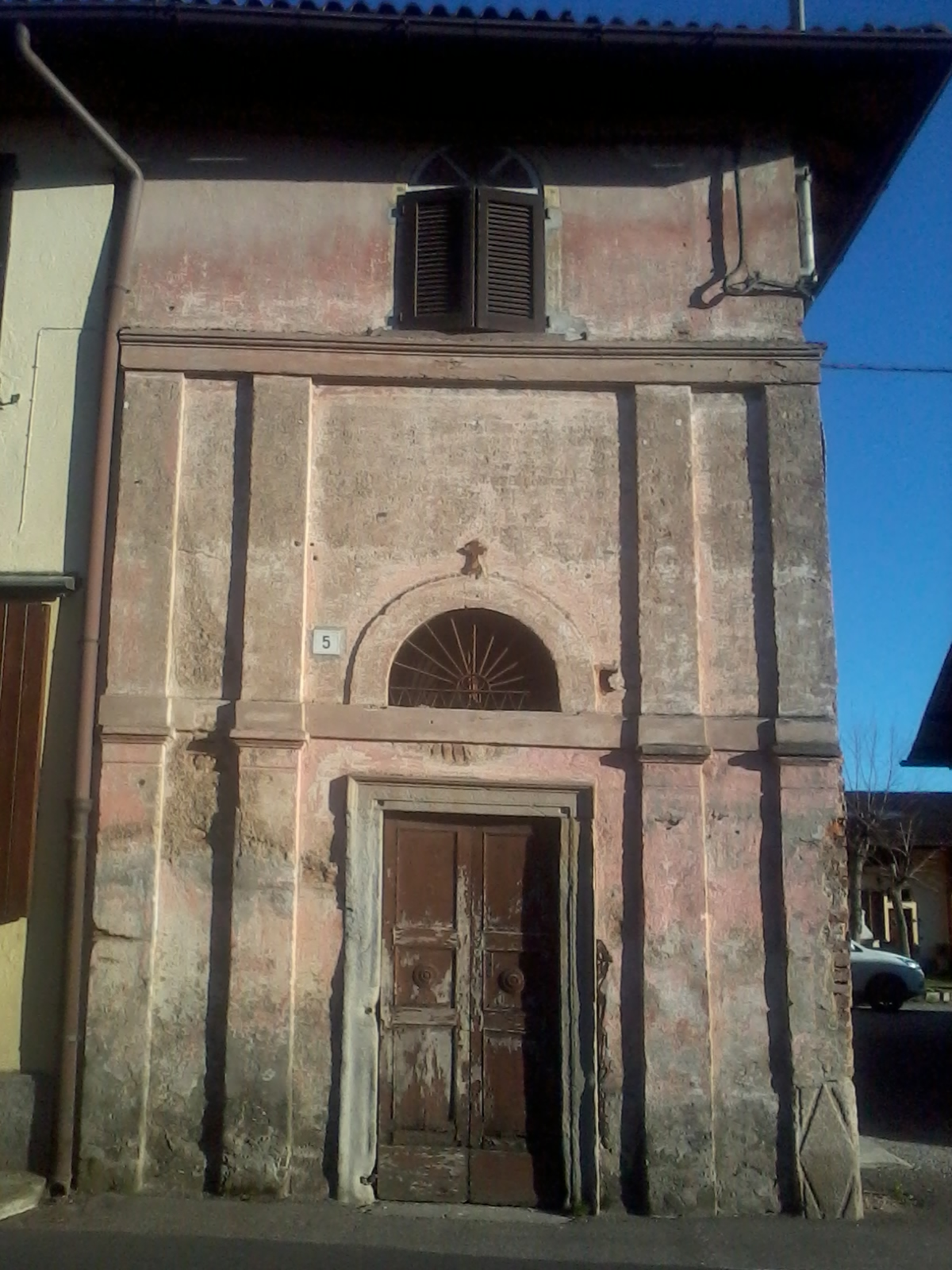 Chiesa di San Giacomo, Cisliano (MI) - Italy